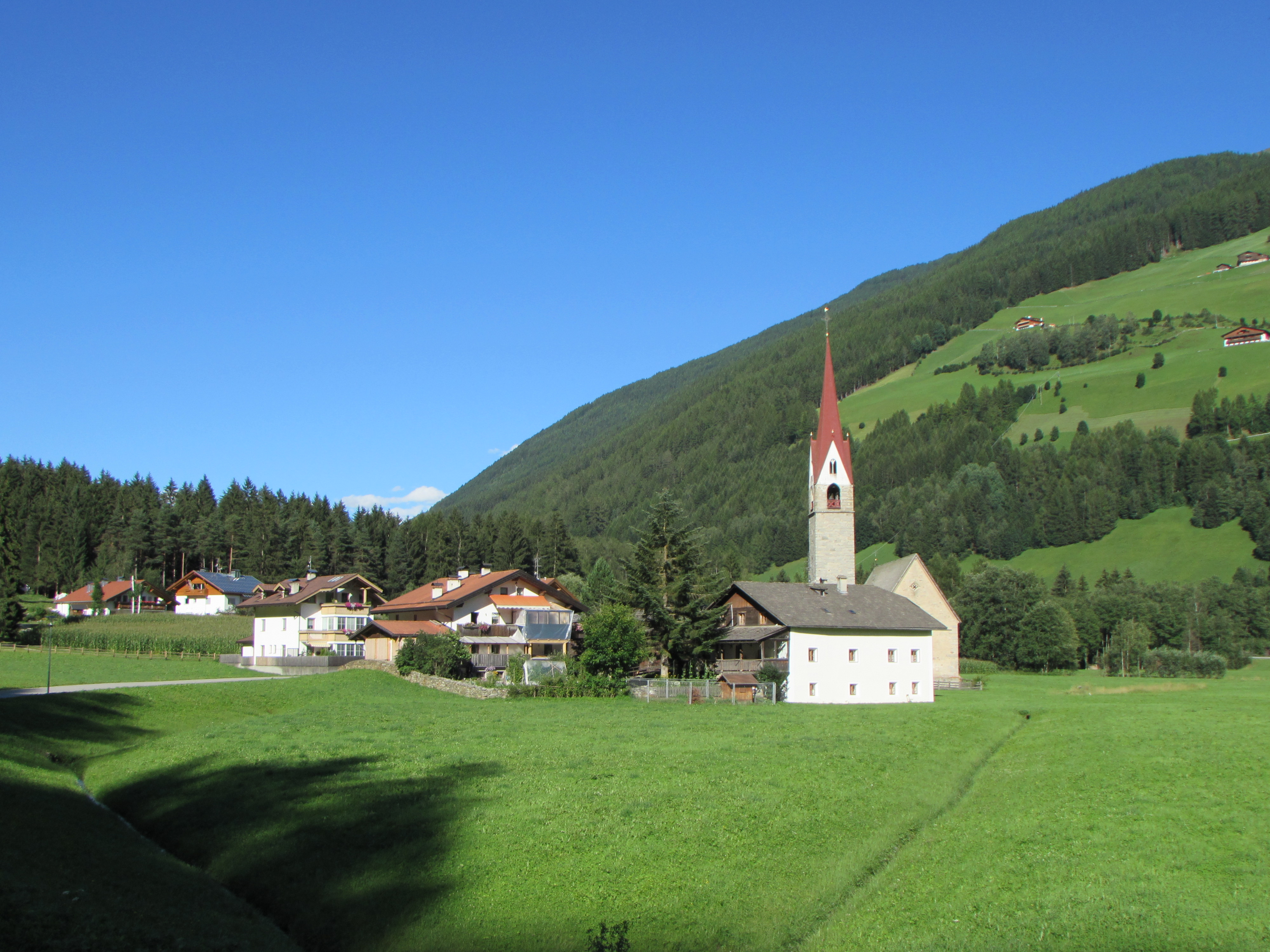 Chiesa di San Martino in Valle Aurina